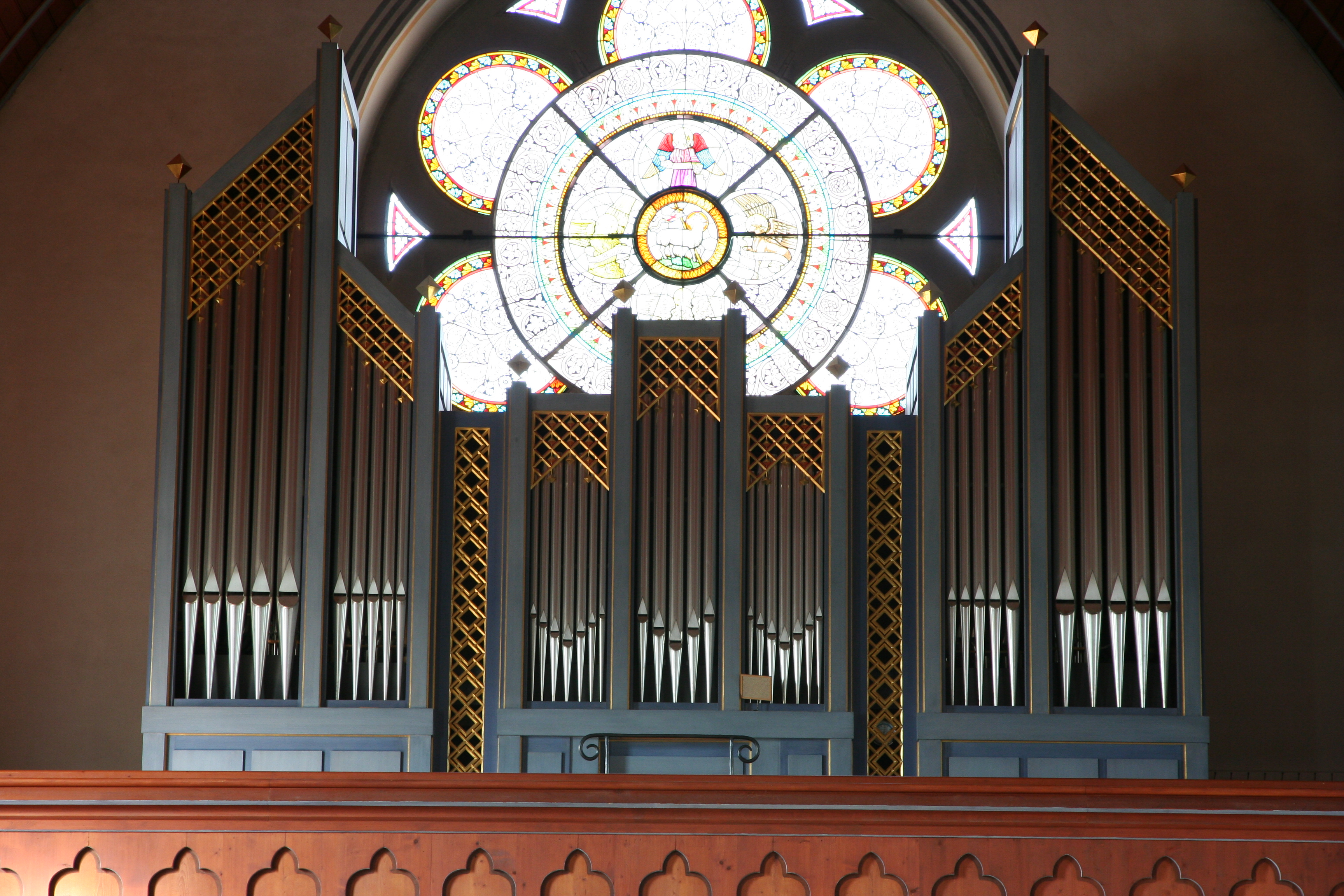 Römisch-katholische Pfarrkirche St. Stephan Männedorf